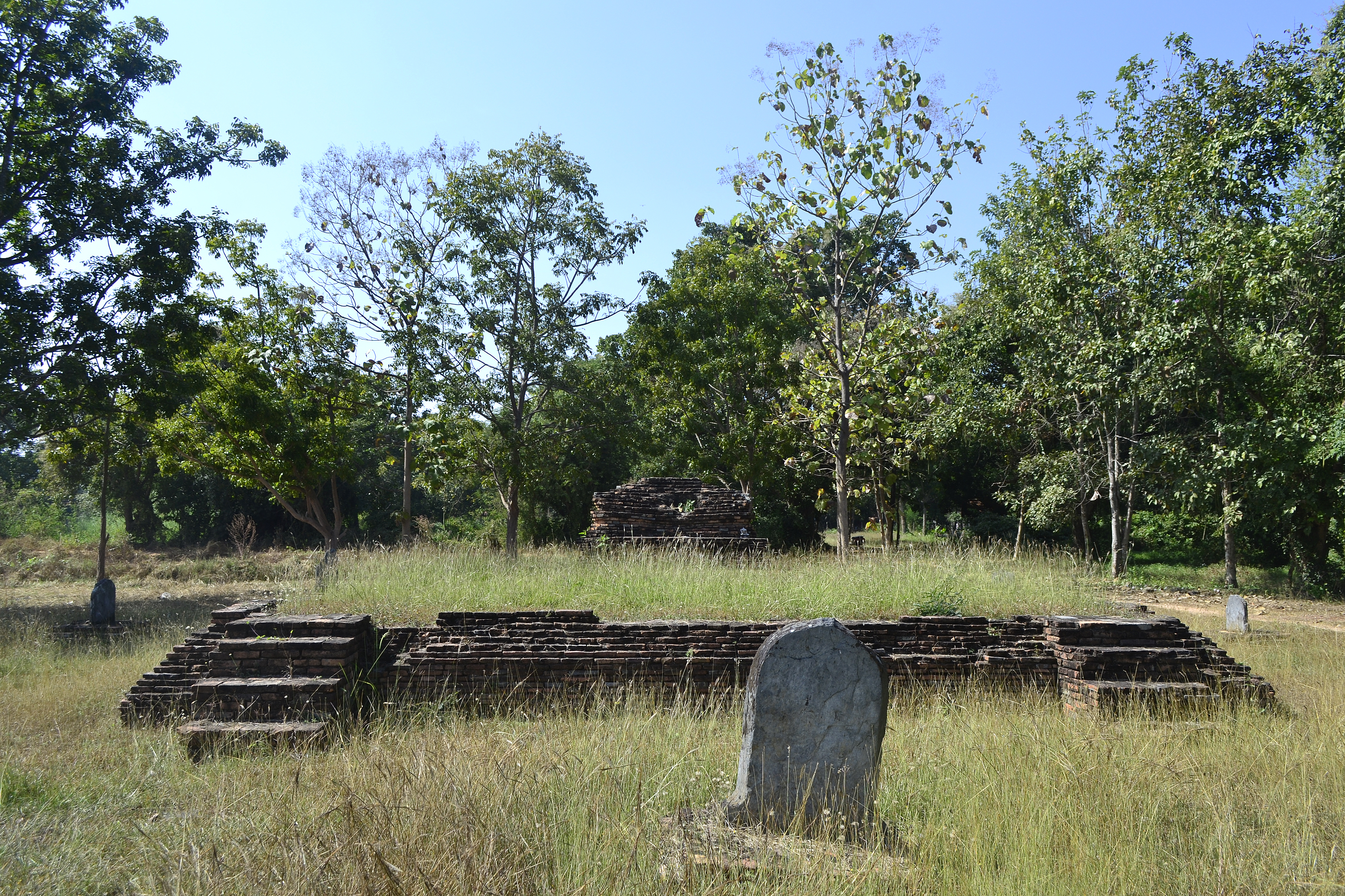 Ubosot des Wat Traphang Tong Lang im Geschichtspark Sukhothai.